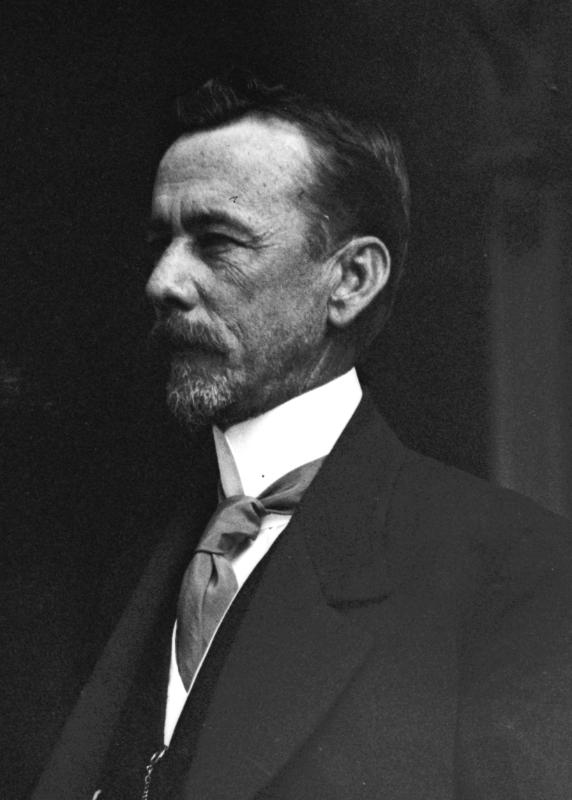 O político e diplomata brasileira Lauro Müller durante visita aos Estados Unidos.